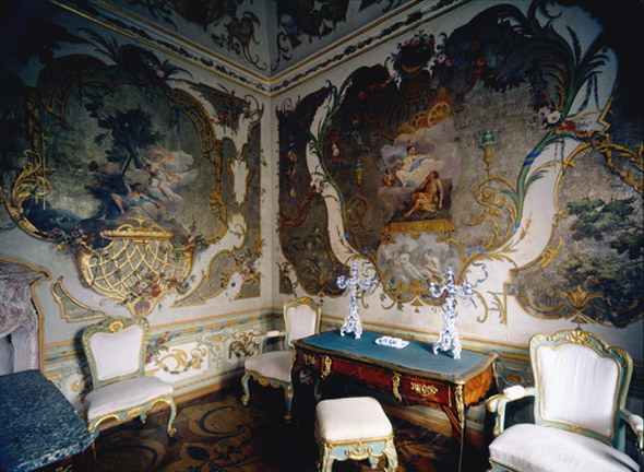 КИТАЙСКИЙ ДВОРЕЦ. ЗОЛОТОЙ КАБИНЕТ